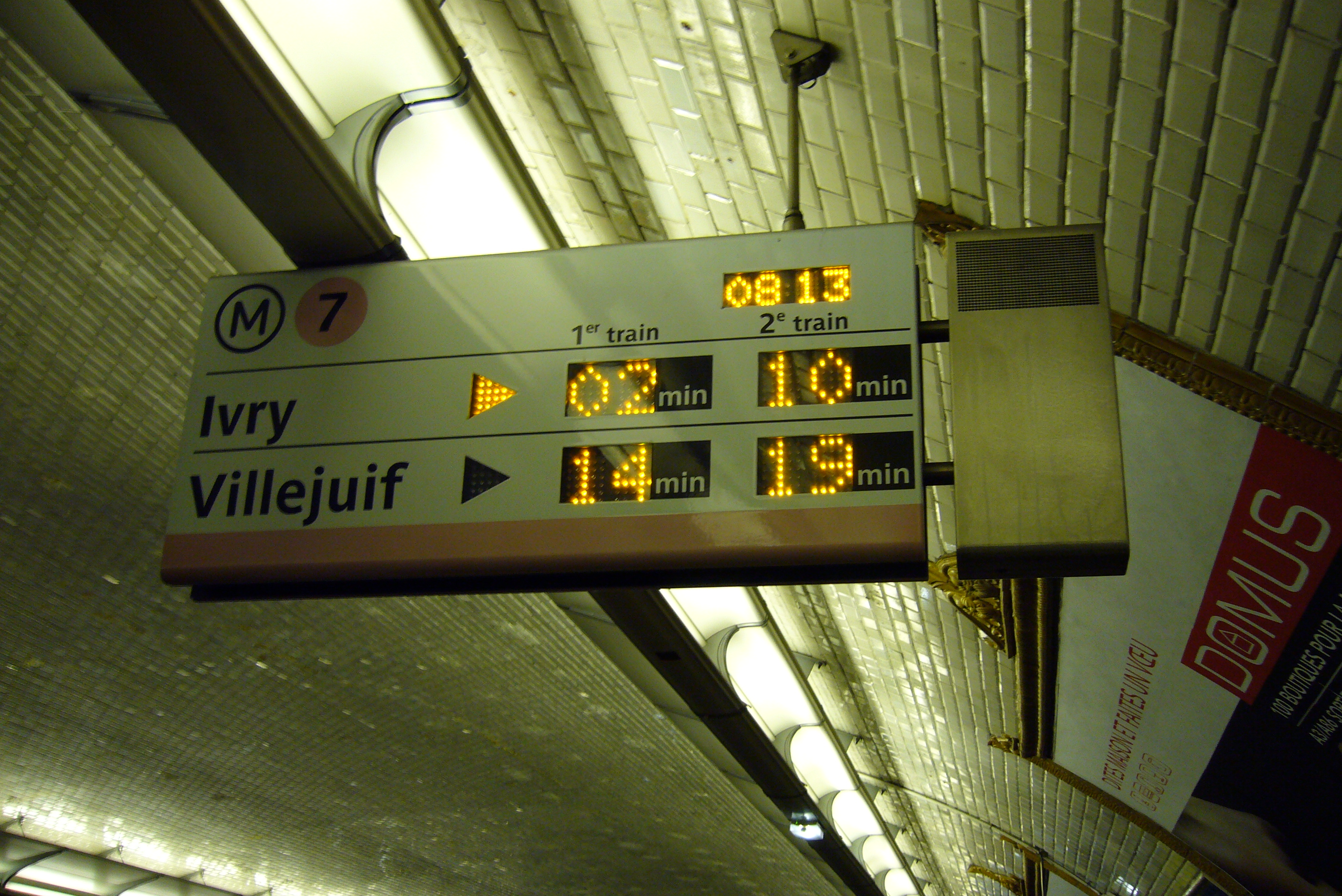 Panneau SIEL sur la ligne 7 du métro parisien